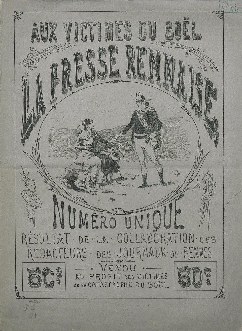 La Presse rennaise : numéro unique en mémoire des victimes du Boël.